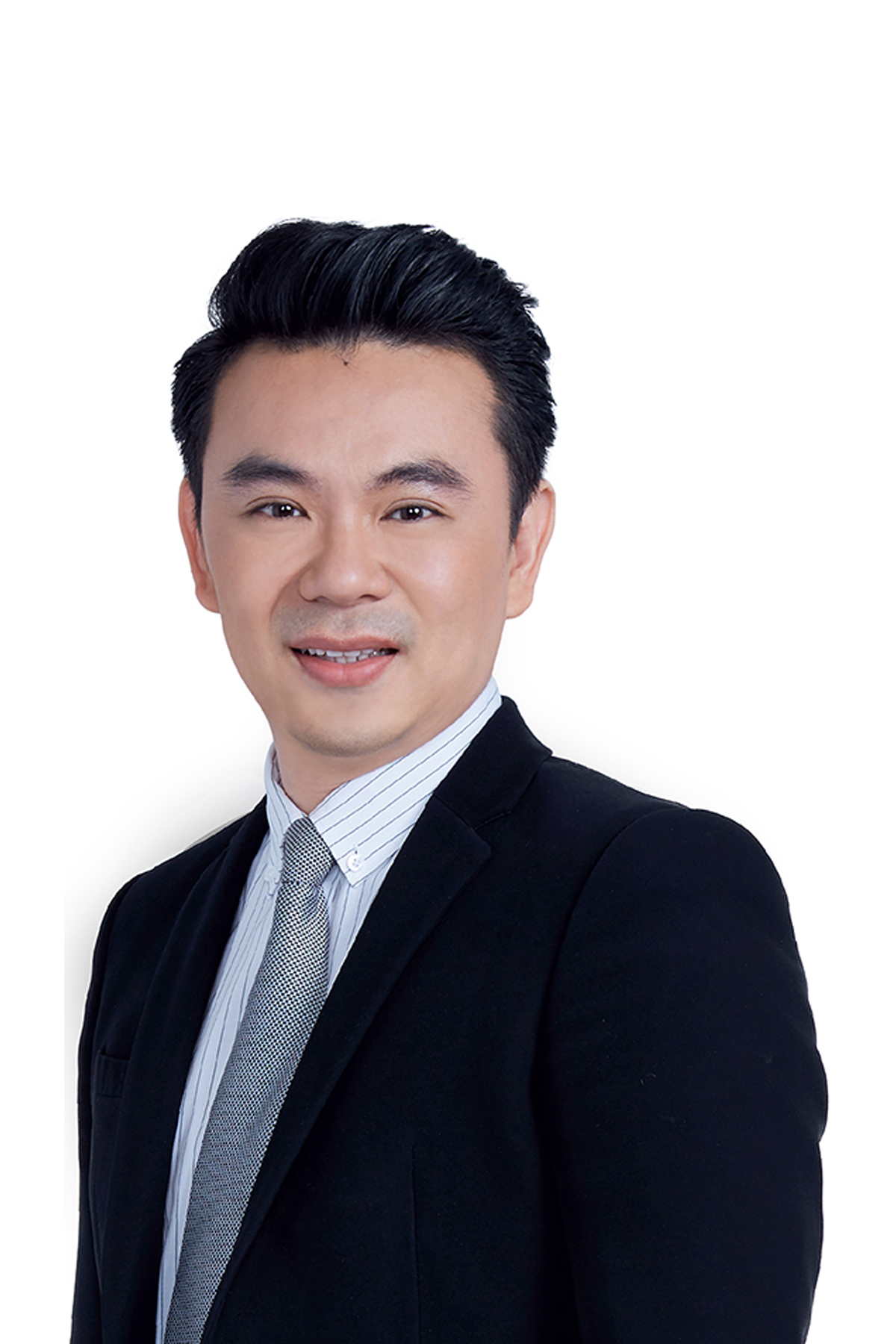 กฤชนนท์ อัยยปัญญา